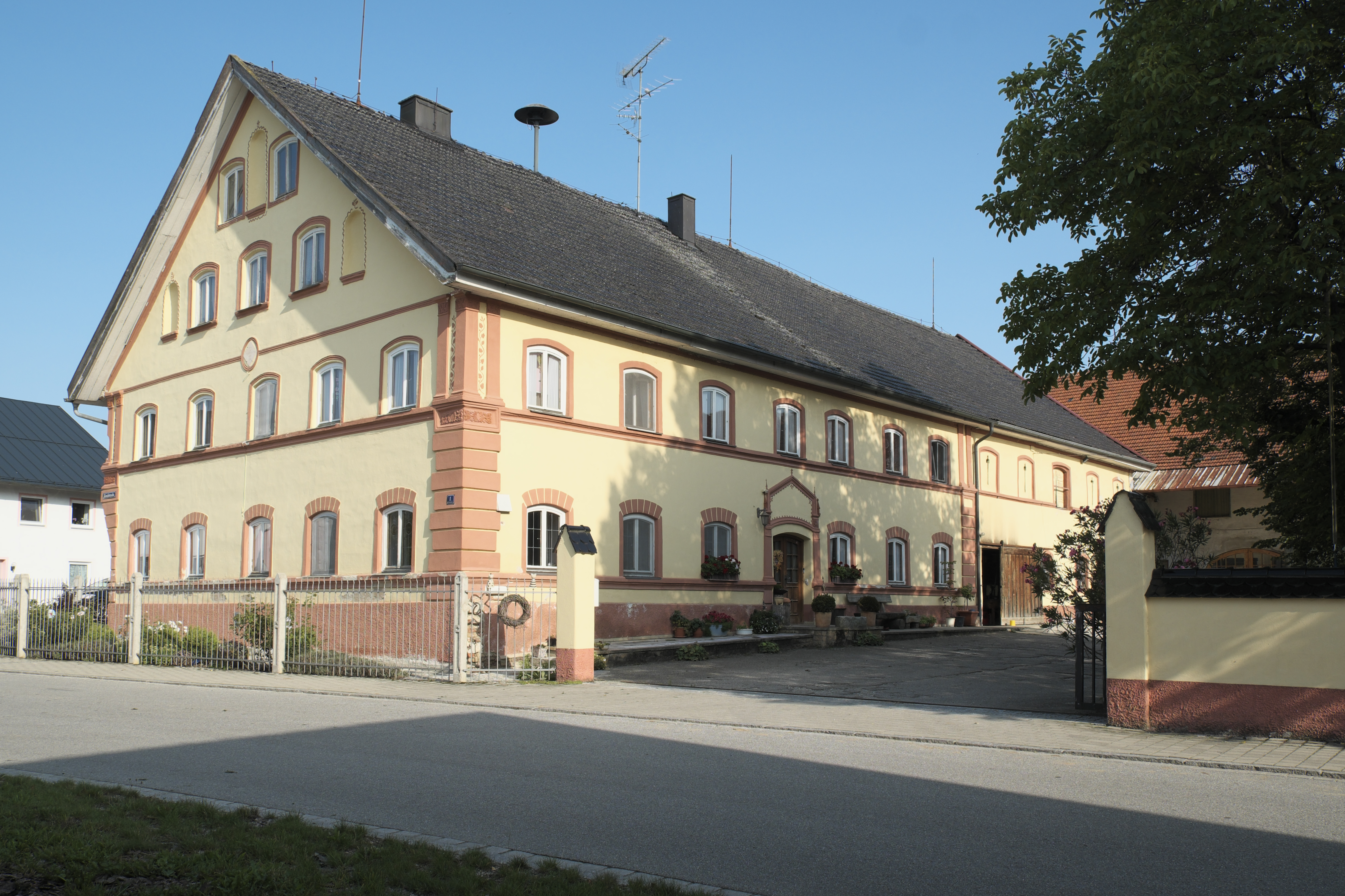 Wohnstallhaus, Dorfstraße 1, in Grucking (Fraunberg) im Landkreis Erding (Bayern/Deutschland)